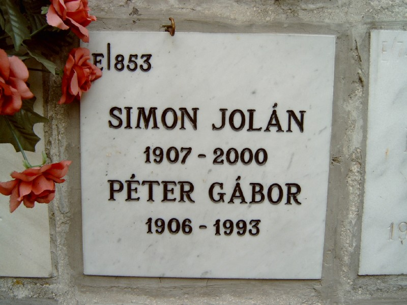 Péter Gábor hamvai a budapesti Farkasréti temetőben (E-853. fülke).